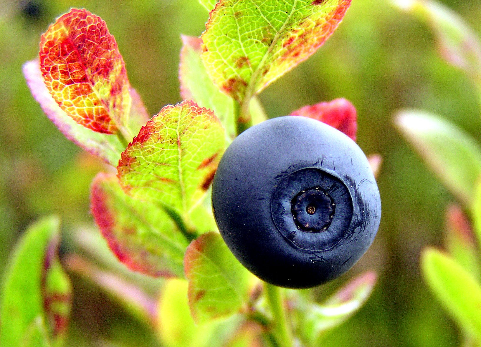 Blueberry